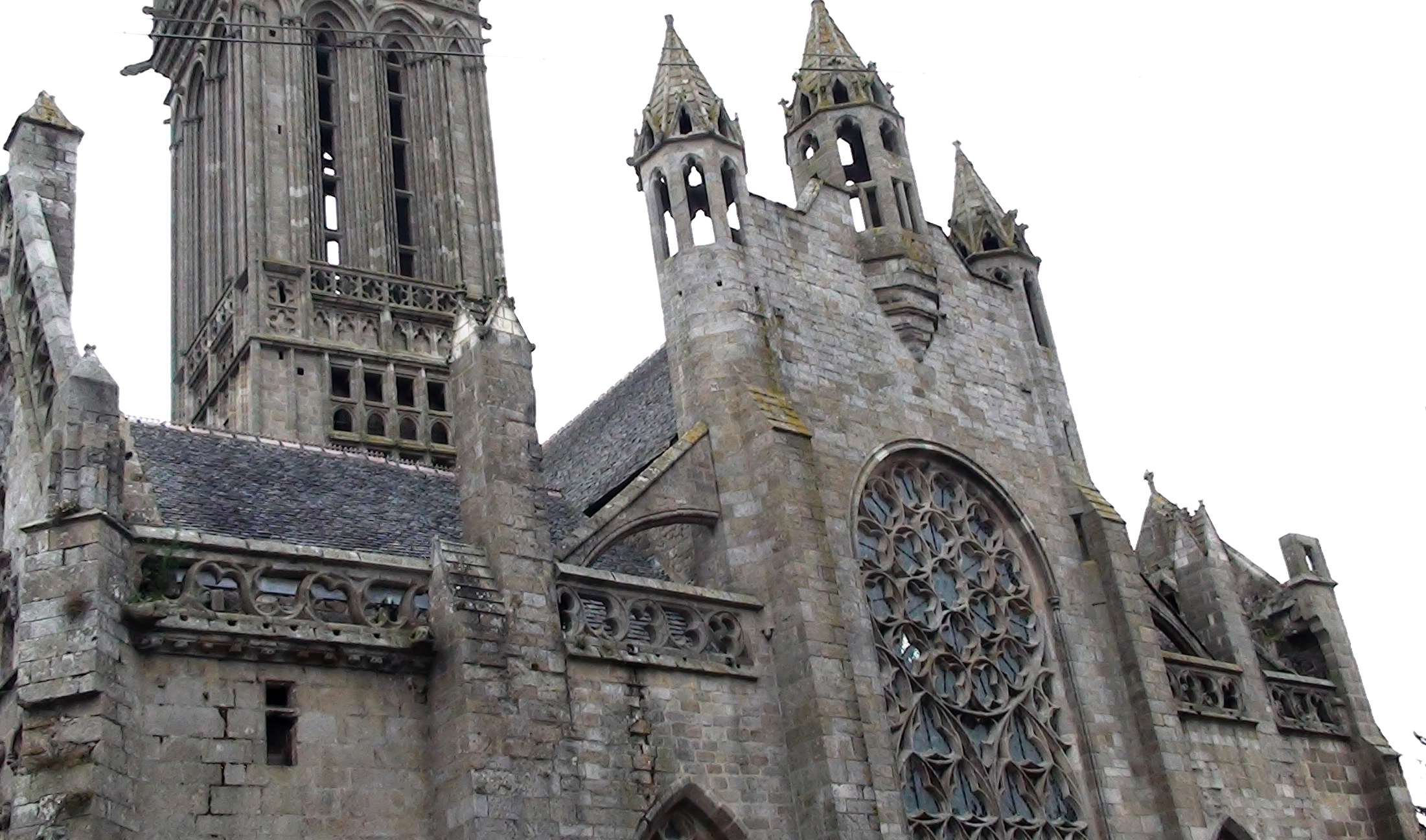 Notre-Dame du Kreisker : rosace du pignon ouest et ses trois clochetons. Le vitrail est actuellement en cours de remplacement par une création colorée de l'artiste Kim En Joong. .